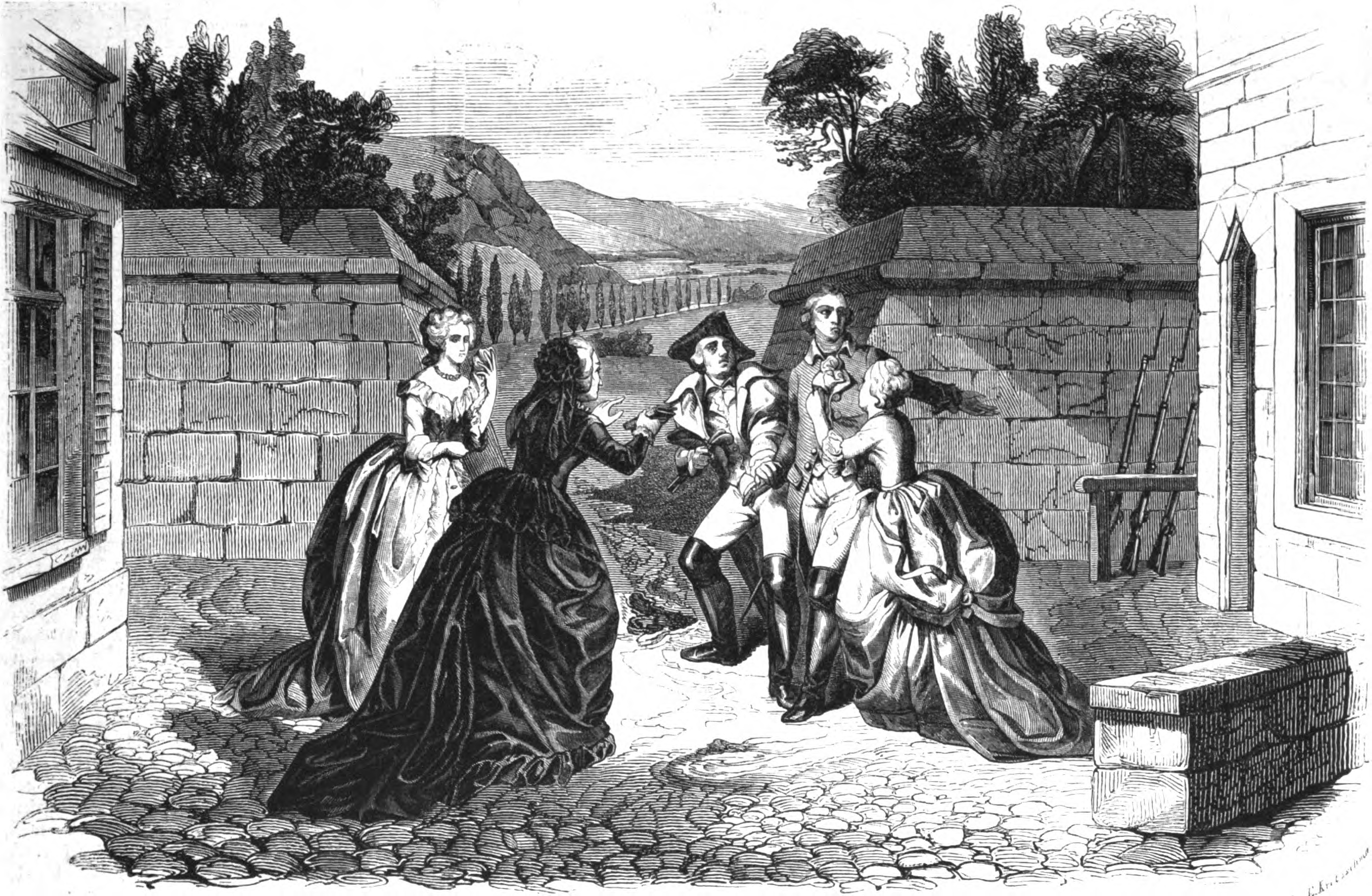 Szene aus dem Theaterstück "Die Karlsschüler" von Heinrich Laube, aufgeführt am Dresdner Hoftheater, 1847.